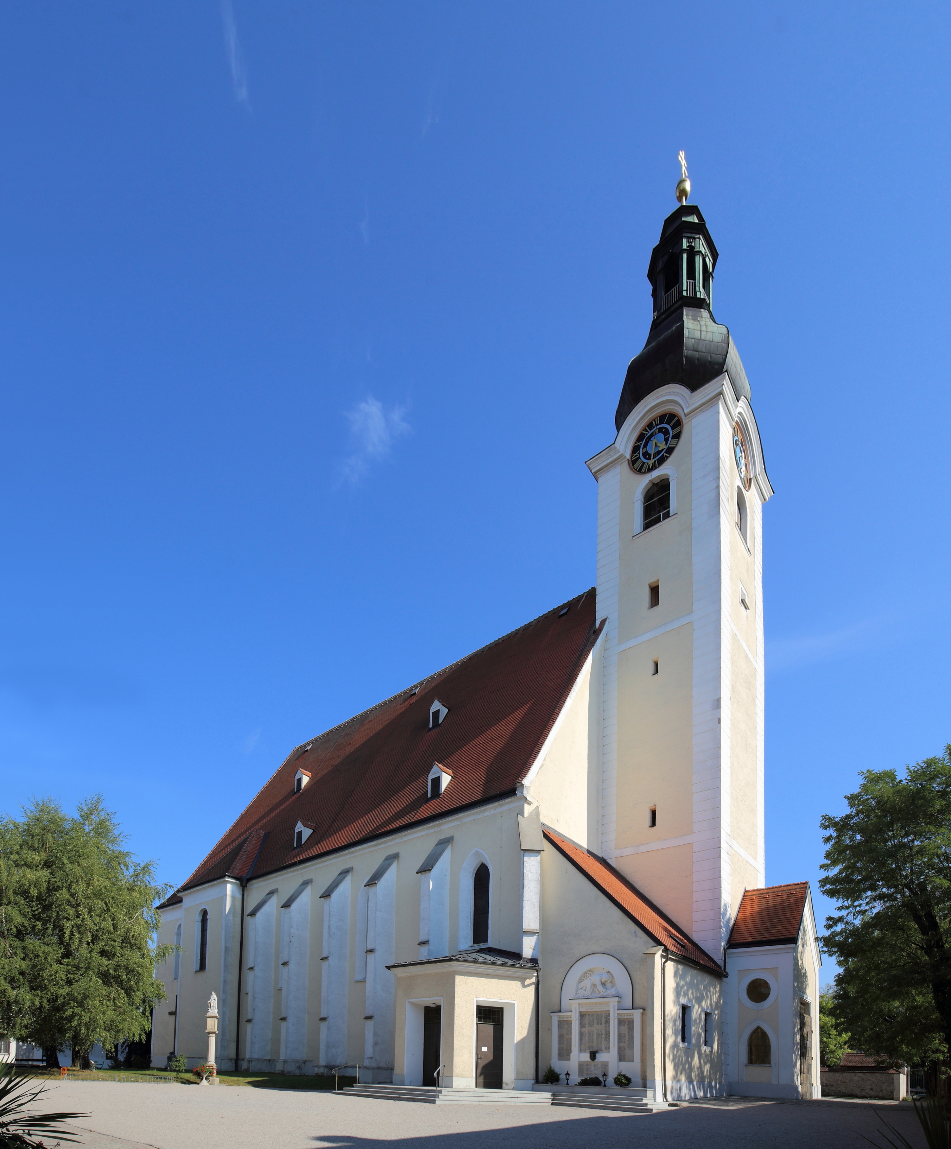 Nordwestansicht der katholischen Pfarrkirche hl. Petrus in der niederösterreichischen Marktgemeinde Purgstall.Eine spätgotische Hallenkirche mit einem im Kern gotischen vorgestellten Westturm sowie neuzeitlichen Anbauten und einem Chorbereich aus der Barockzeit. Das Kriegerdenkmal mit Relief Kreuztragender Christus aus dem Jahr 1923 stammt von Josef Schagerl senior.